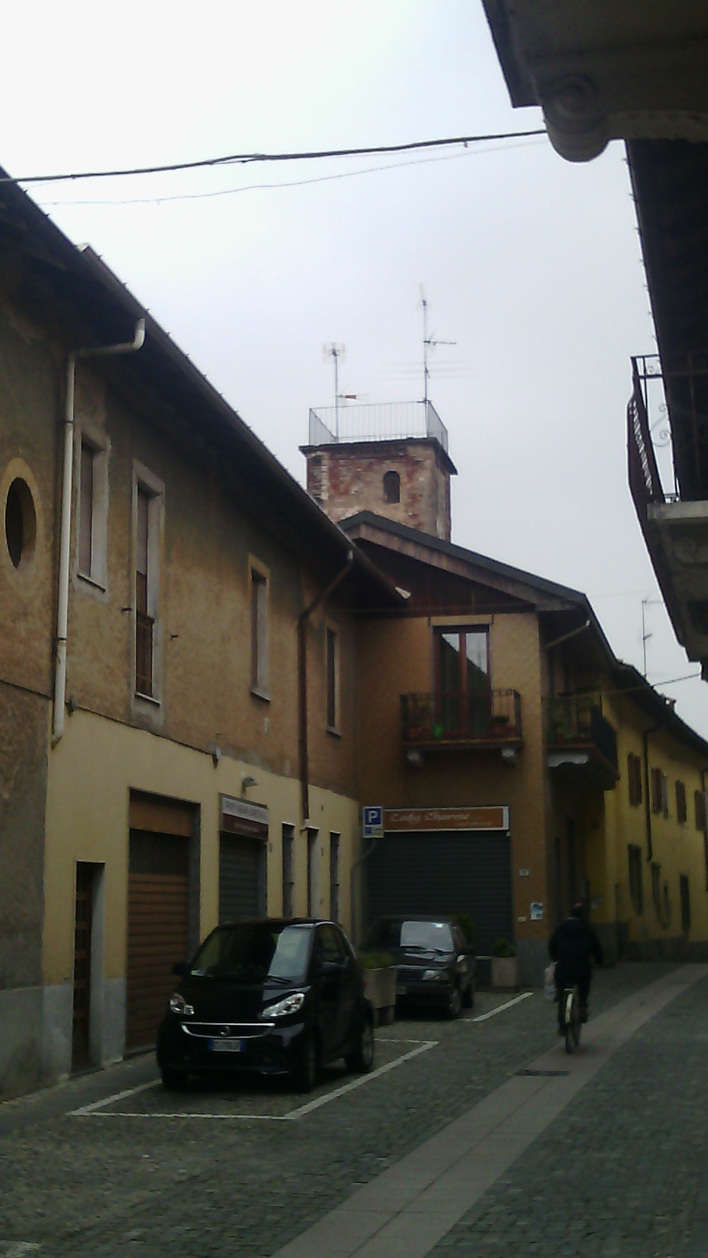 Il campanile dell'antica chiesa parrocchiale di Boffalora sopra Ticino (MI)